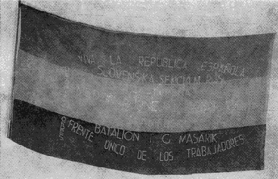 Bandera del Batallón T.G. Masaryk de la CXXIX Brigada Internacional.